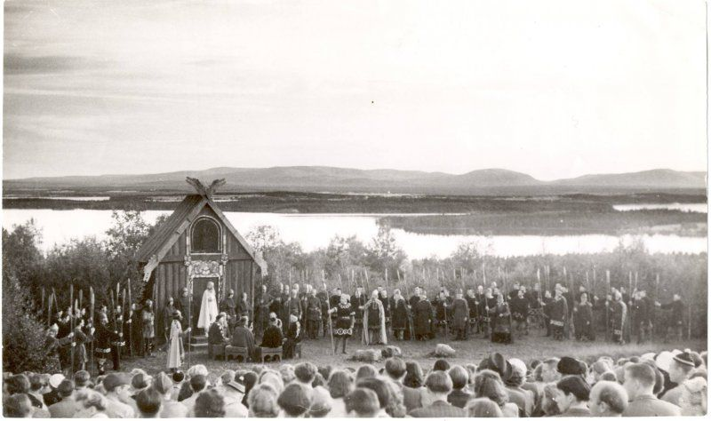 Arnljotspelen på Frösön